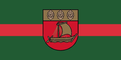 Valdemārpils pilsētas karogs